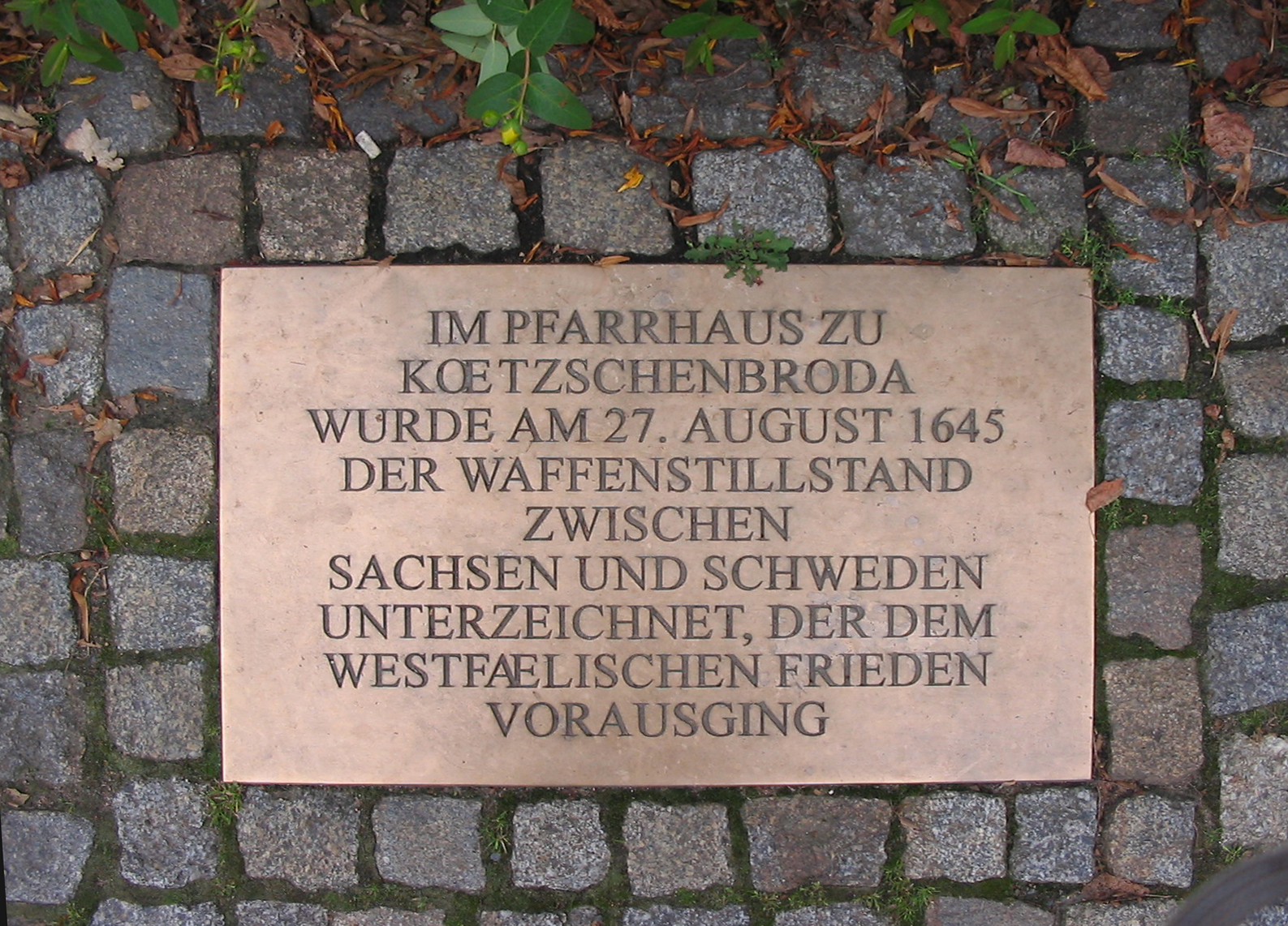 Gedenktafel am Pfarrhaus von Kötzschenbroda (Radebeul)